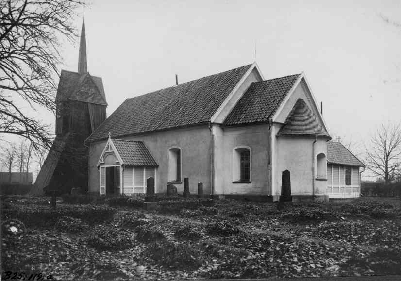 Torskinge kyrka